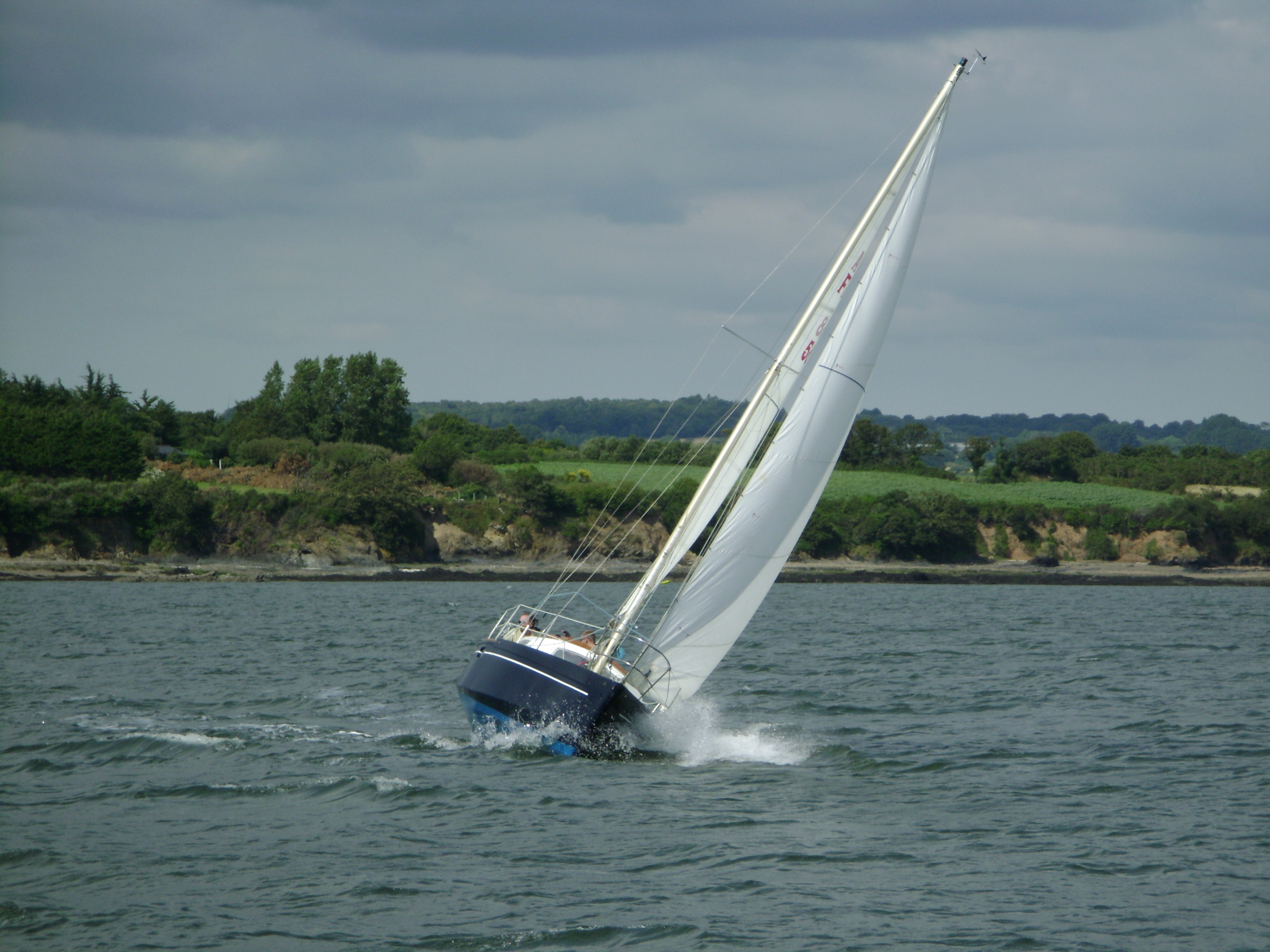 Logonna-Daoulas, louvoyage en rade de Brest, près de l'entrée de la rivière de Daoulas.JPG Armagnac Ventre Bleu (architecte Philippe Harlé) au près